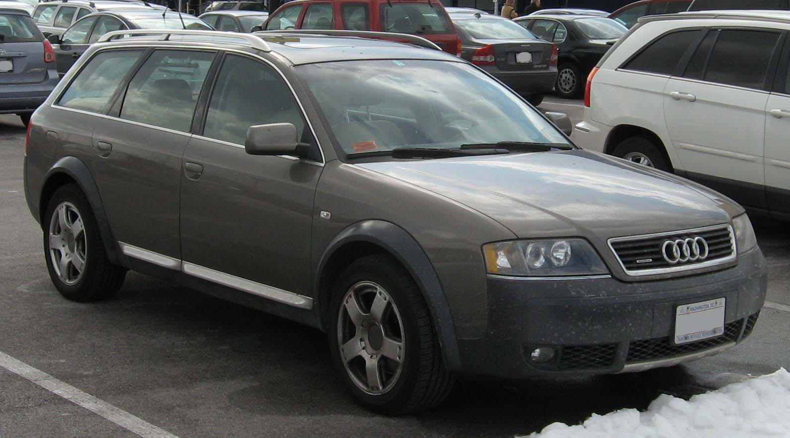 1999-2005 Audi Allroad quattro photographed in USA.